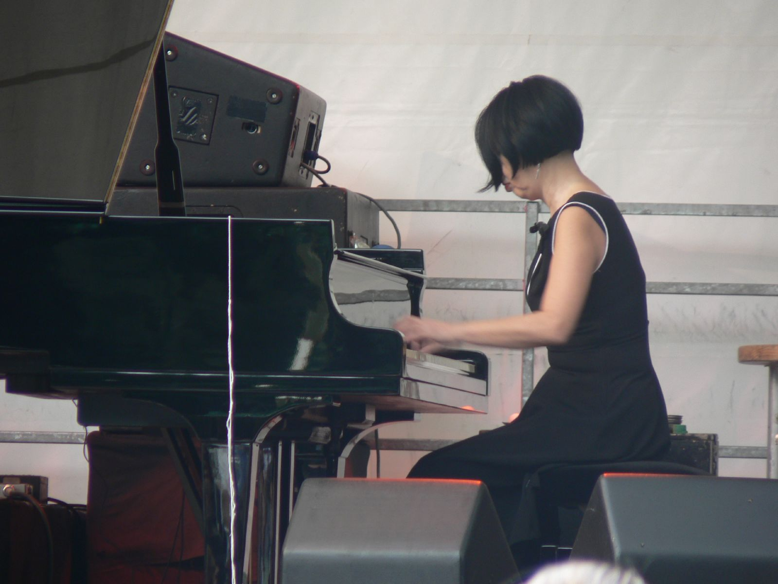 Aki Takase